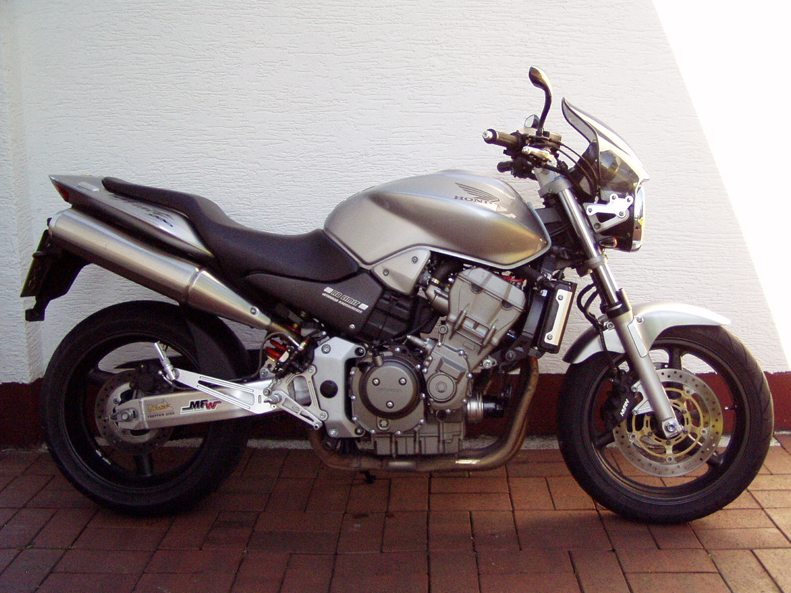 CB 900 F Hornet Sonstiges: Olympus C-175 Ultra Zoom